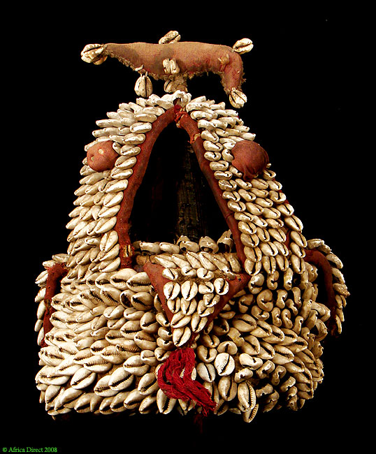 Ile Ori tradicional iorubá. Este é um dos muitos modelos, mas basicamente são compostos deste forma. Não usam ota.